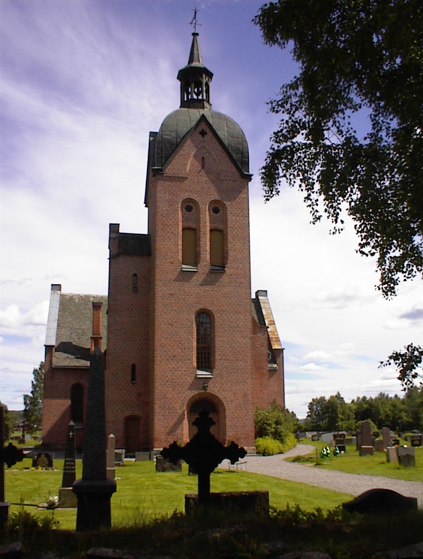 Strøm kirke i Sør-Odal, Norway